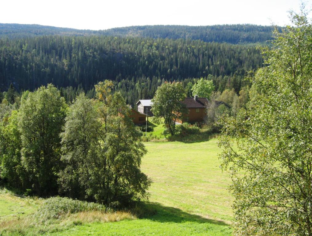 Midtbø in Vinje, home of norwegian novelist Tarjei Vesaas and poet Halldis Moren Vesaas